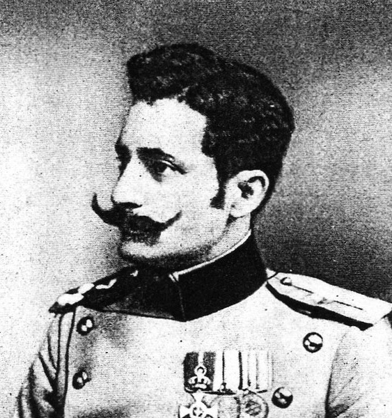 Vojislav Tankosić (1881-1915)